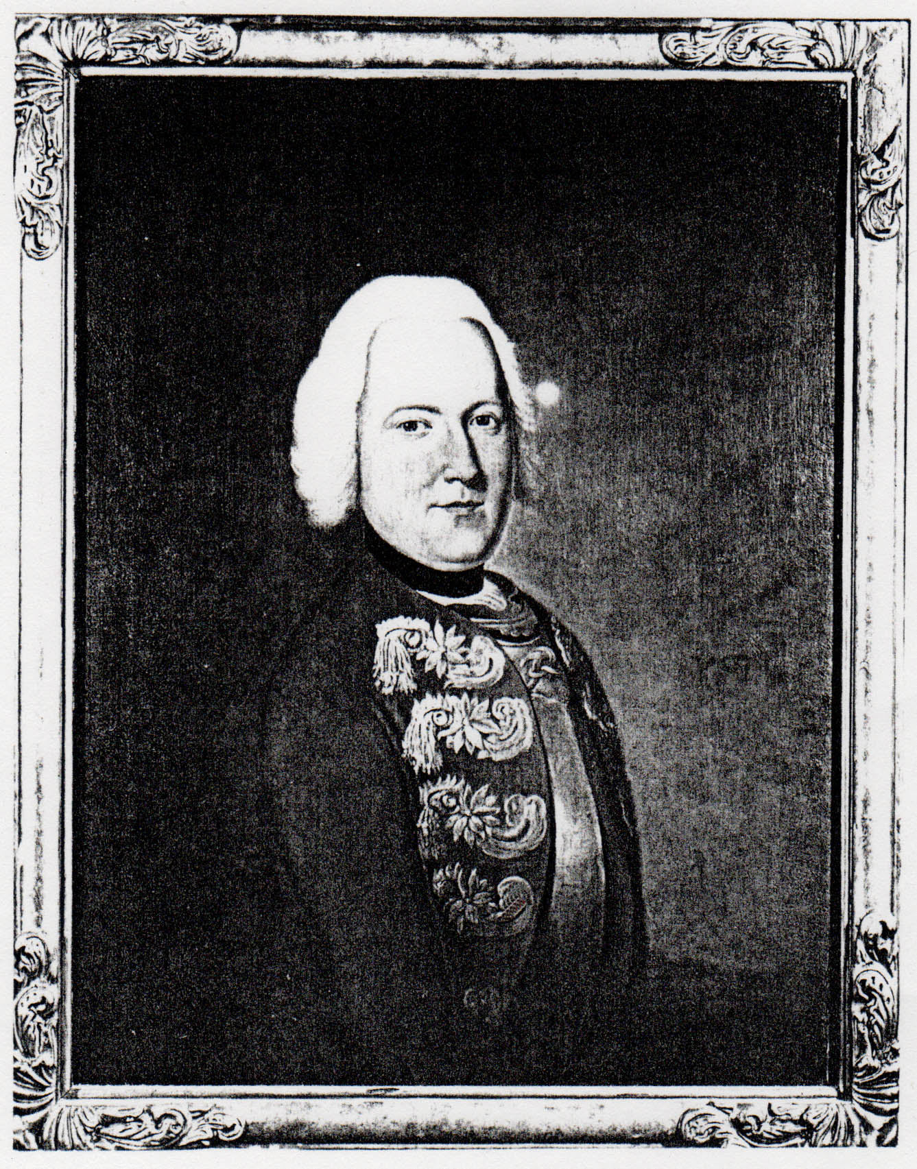 Ernst Ludwig von Pfuel (* 20. April 1718 in Gielsdorf; † 23. Juli 1789 in Berlin) war ein königlich-preußischer Generalmajor, vormals Hofmarschall des Prinzen Friedrich Wilhelm von Preußen und Gutsherr auf Jahnsfelde.